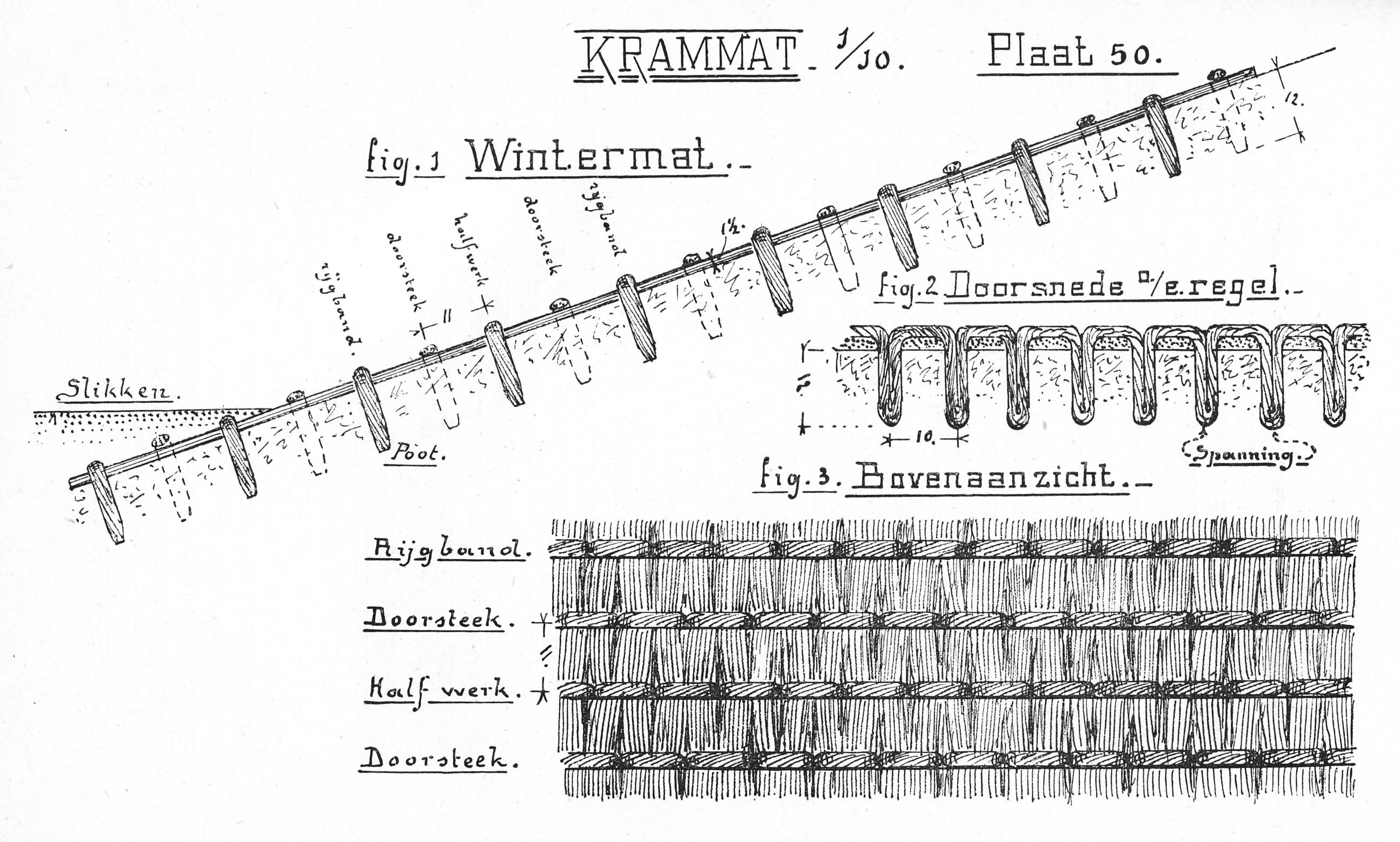 Krammat ter bescherming van een kleitalud onder wintercondities.